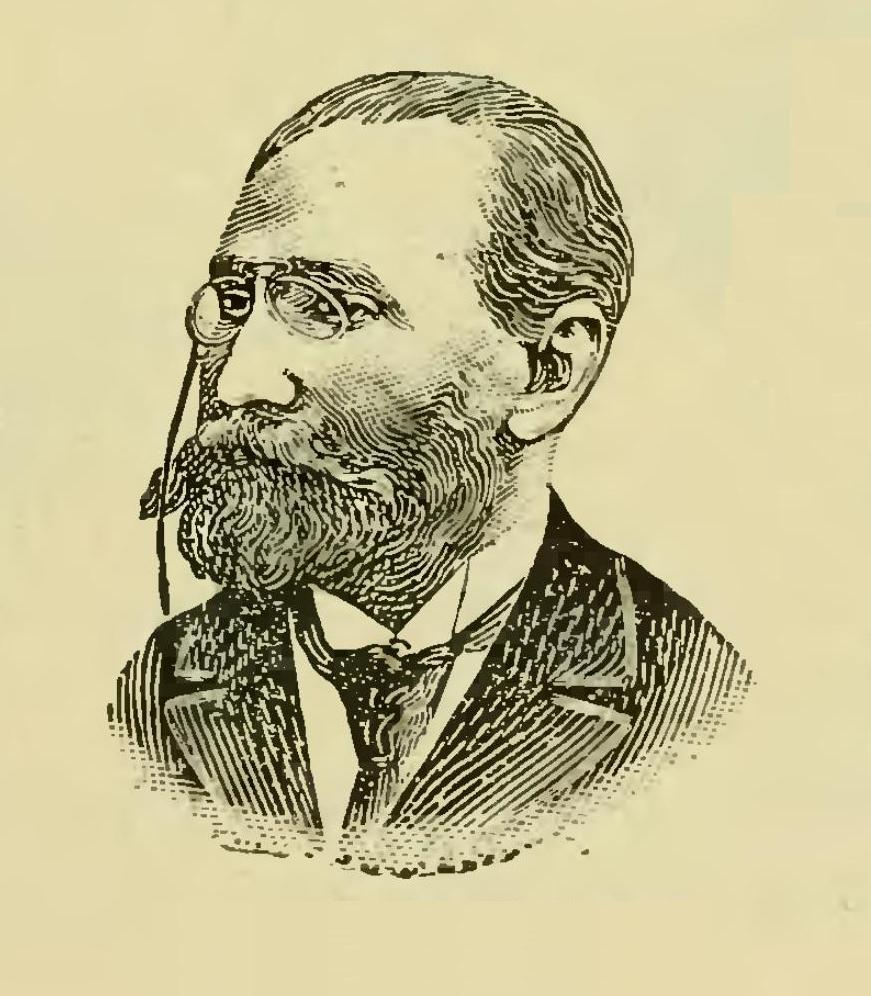 Aristides Lobo, político brasileiro